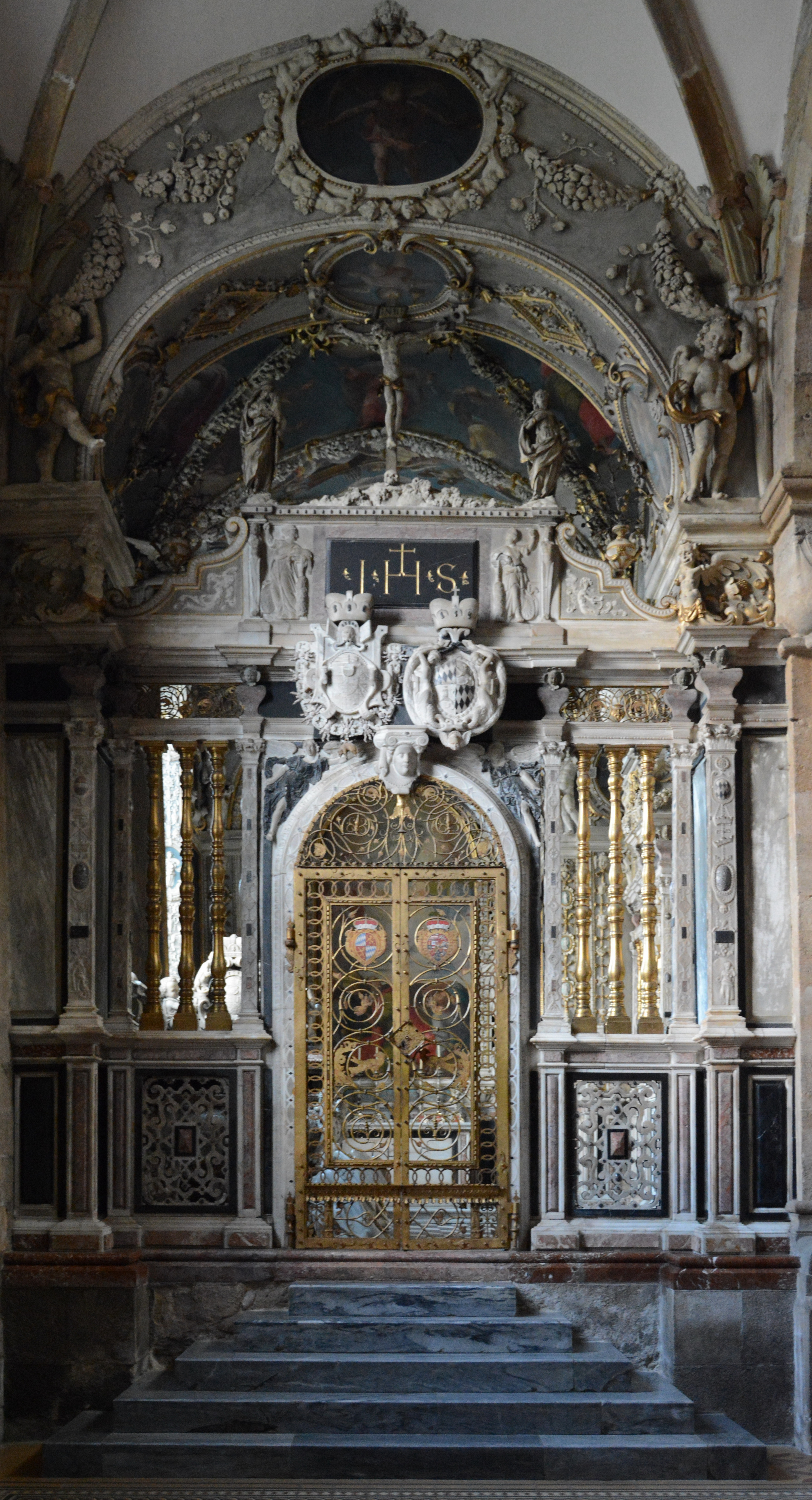 Seckau – Mausoleum, inszeniertes Sterben: Basilika Seckau, Habsburger Mausoleum, Eingangsbereich Dieses Bild wurde anlässlich des österreichischen Tags des Denkmals 2014 in der Steiermark eingereicht.